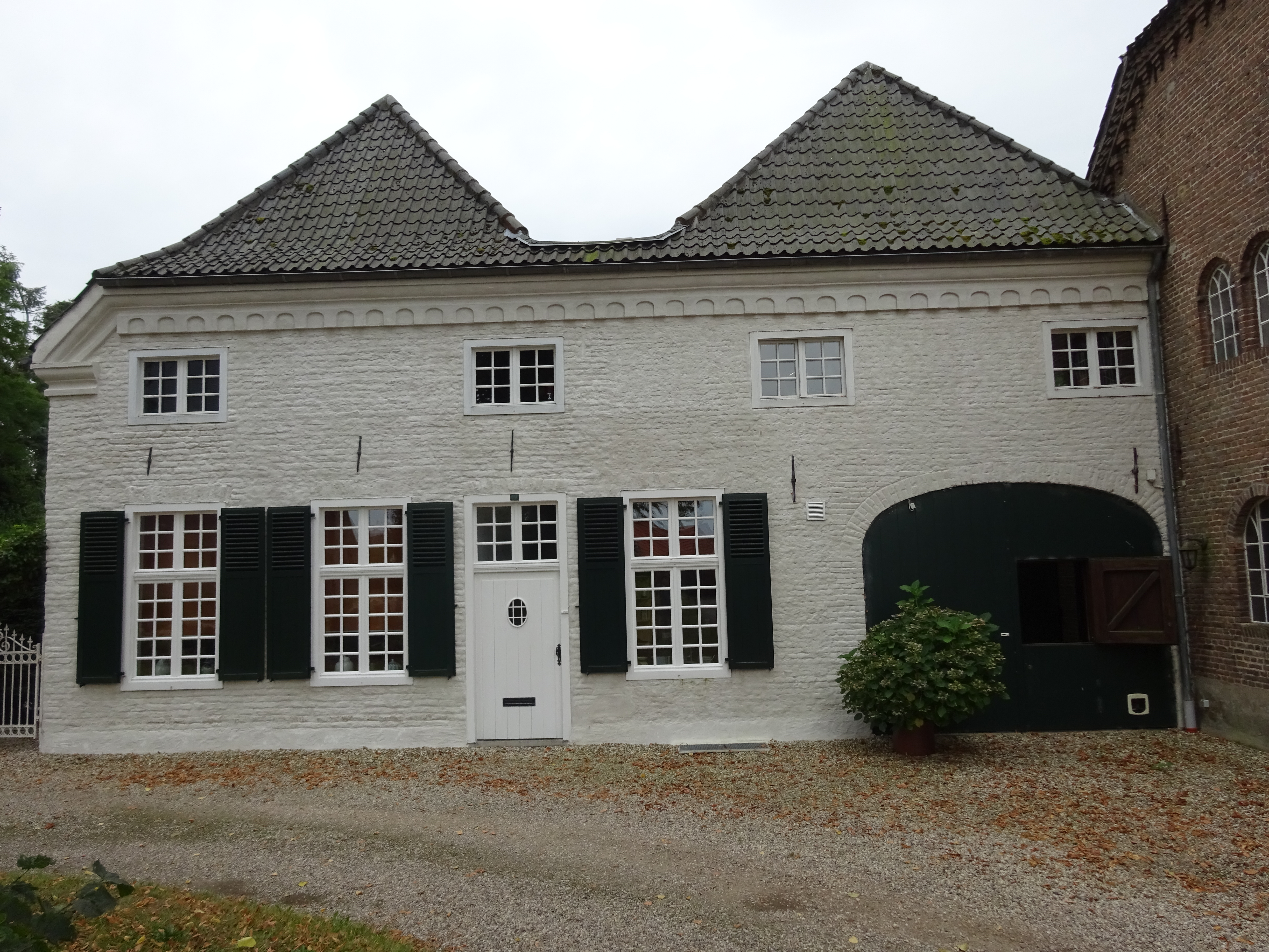 Köstersdick 19, Kalkar-Wissel